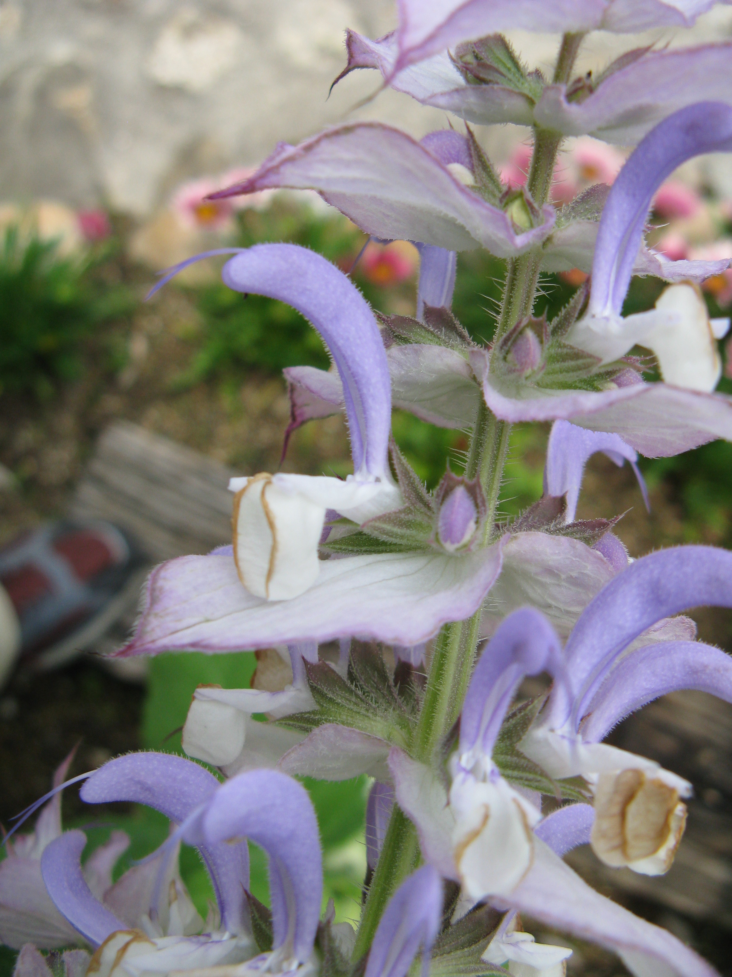 Scientific name Salvia desoleana Place:Osaka,Japan